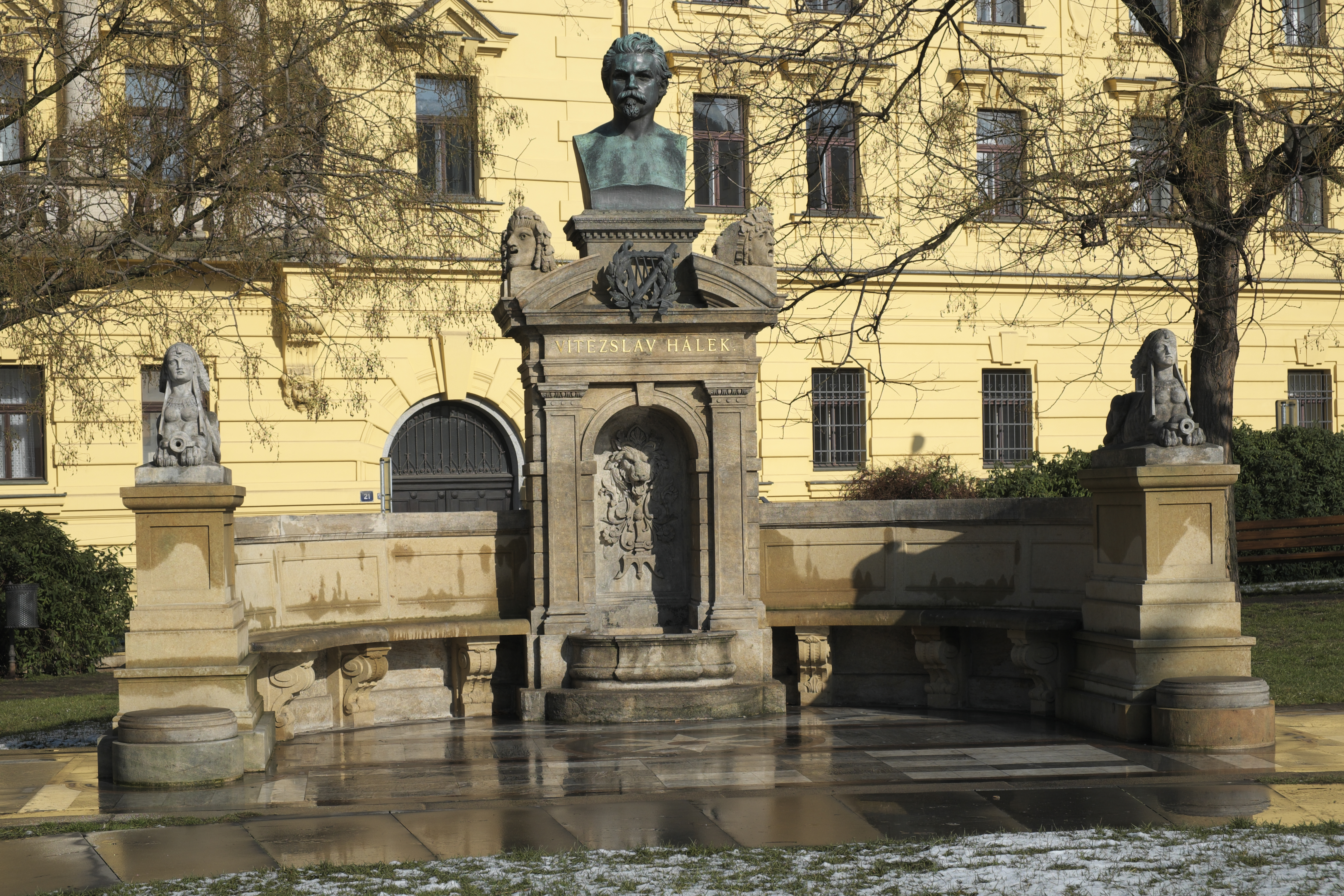 Karlsplatz in der Prager Neustadt (Tschechien), Denkmal für Vítězslav Hálek